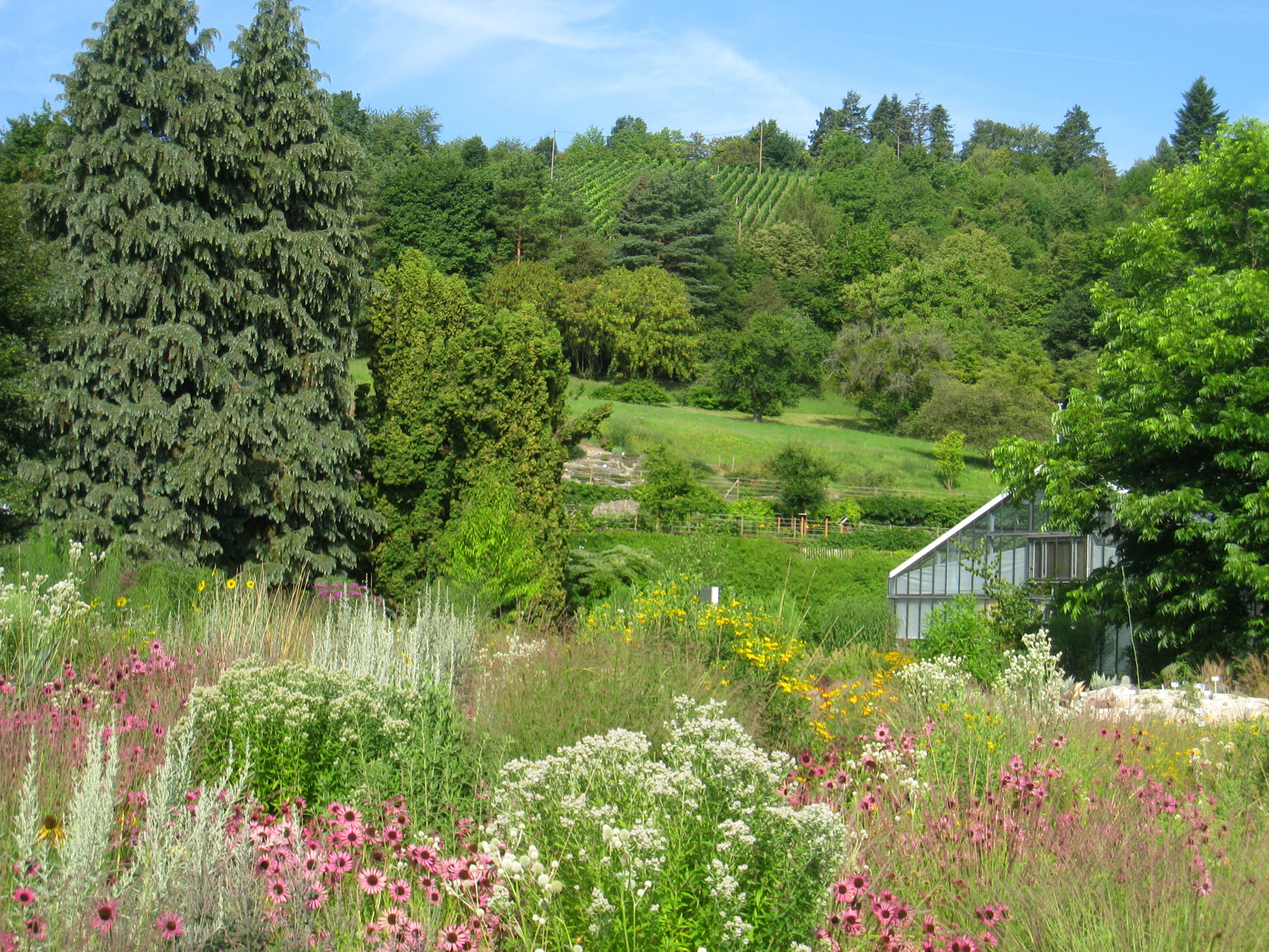 General view - Botanischer Garten der Universität Würzburg, Würzburg, Germany.